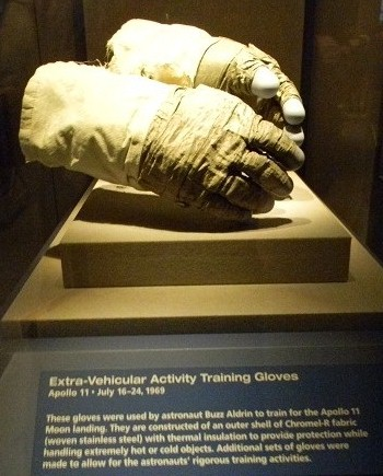 Les gants d'entrainement aux sorties extra véhiculaires de Buzz Aldrin, pour la mission Apollo 11, exposés au Kennedy Space Center.